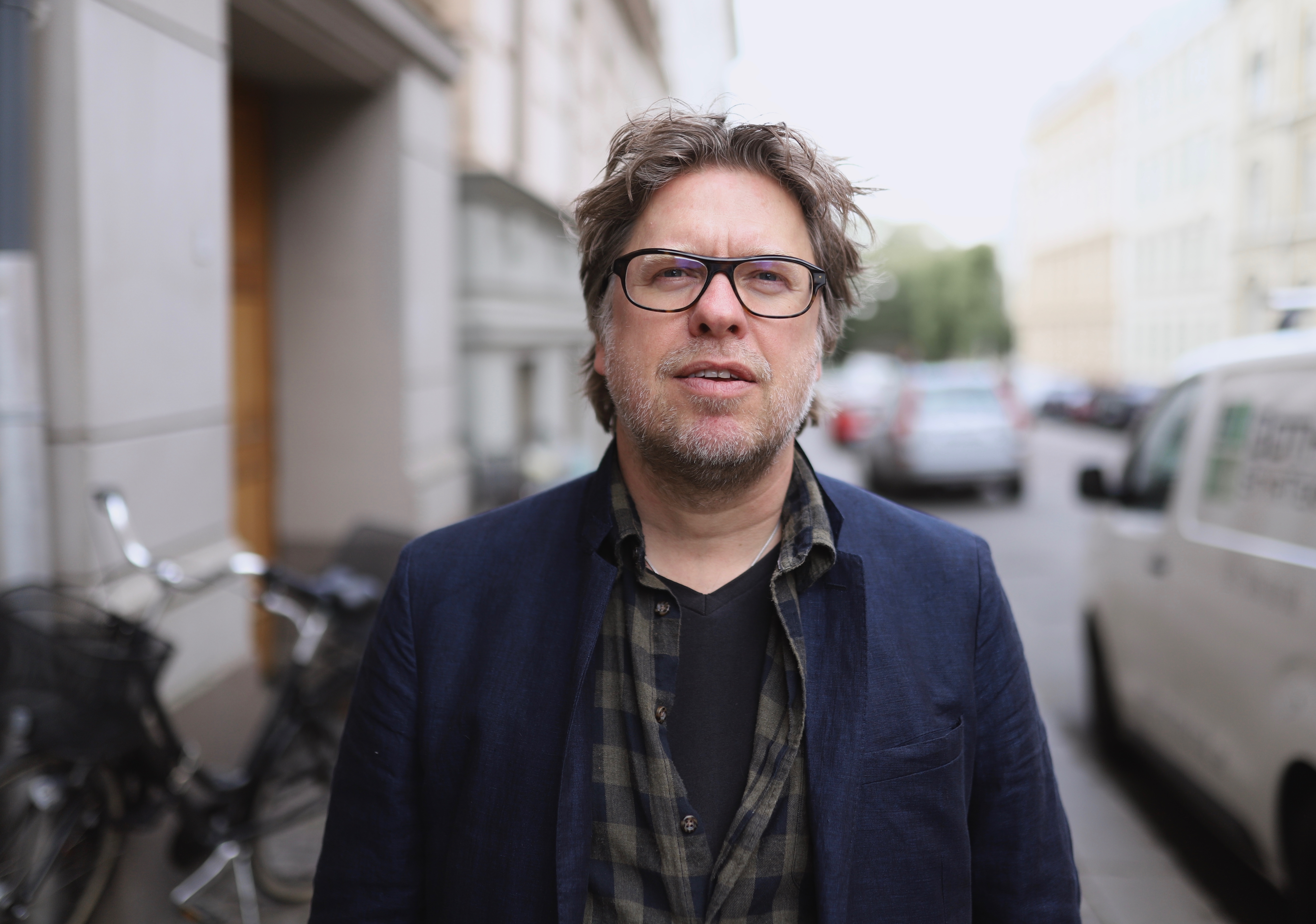 Göteborgskonstnären Carl Bjerkås, våren 2019.